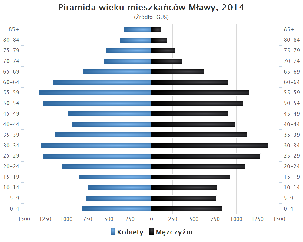 Piramida wieku mieszkańców Mławy, 2014